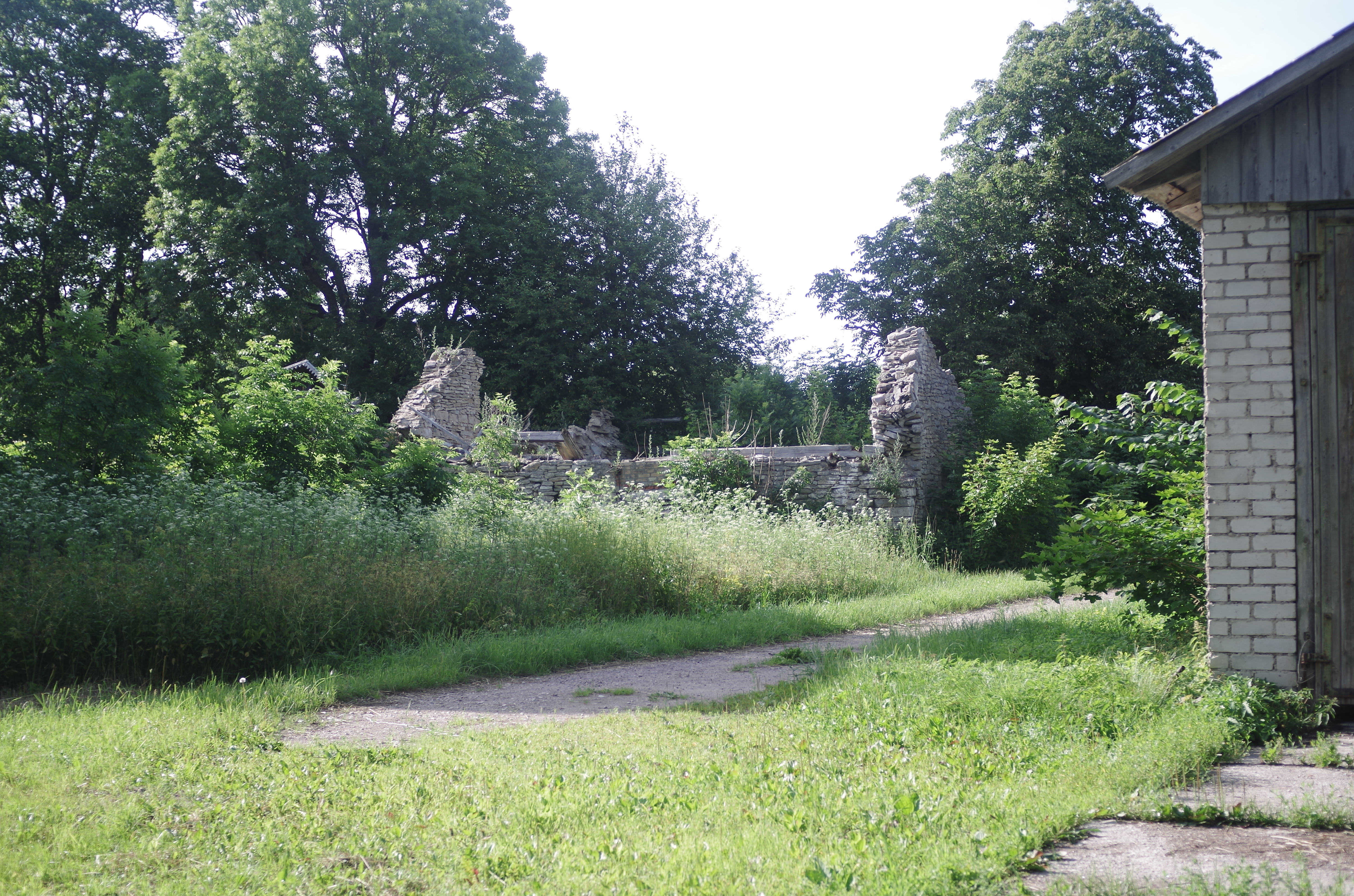 Pihtla mõis Saaremaal Pihtla vallas. (Foto: 2014)